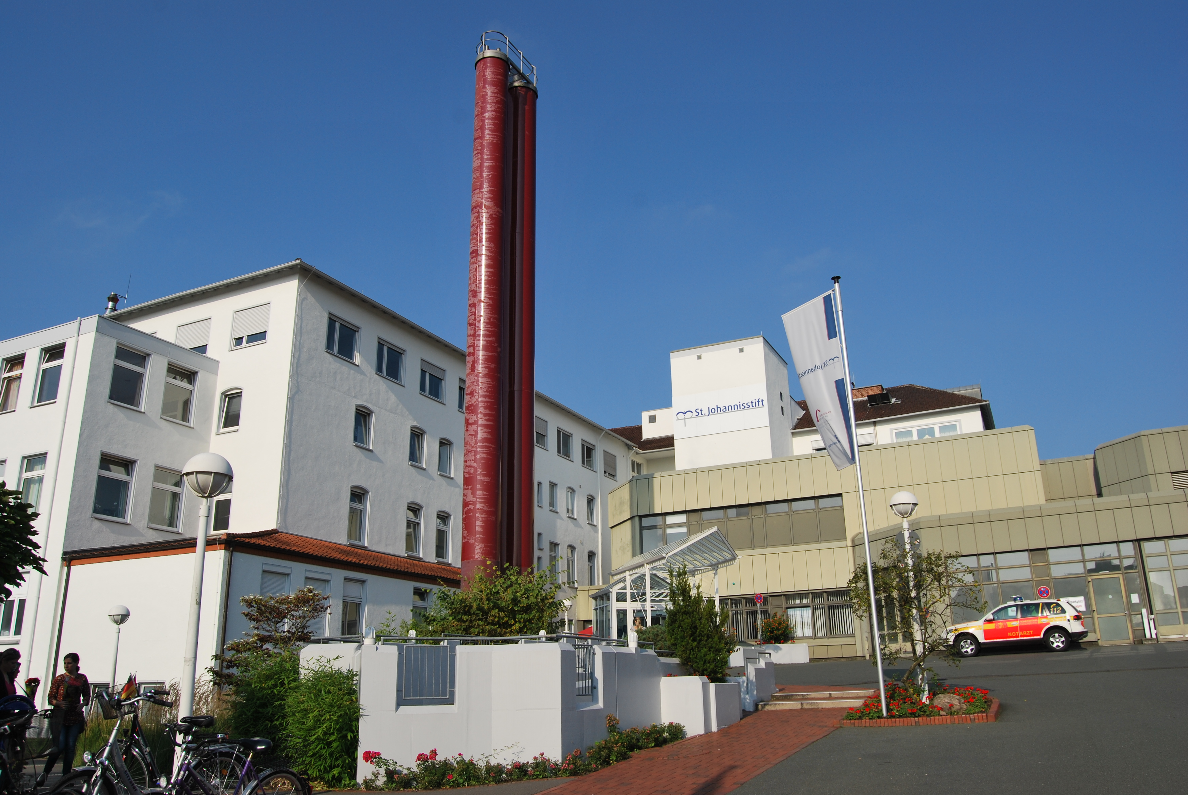 Ev. Krankenhaus Paderborn